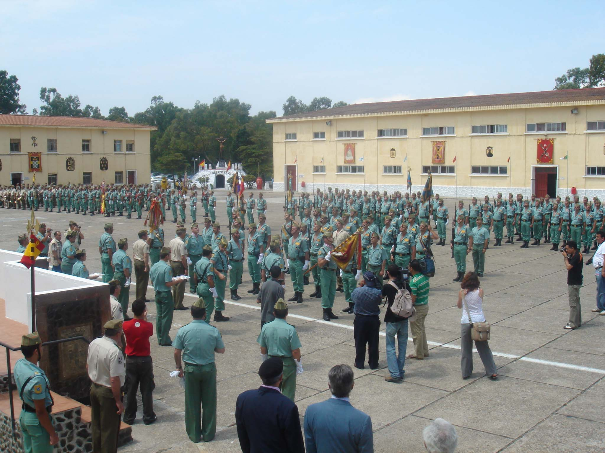 Sábado Legionario